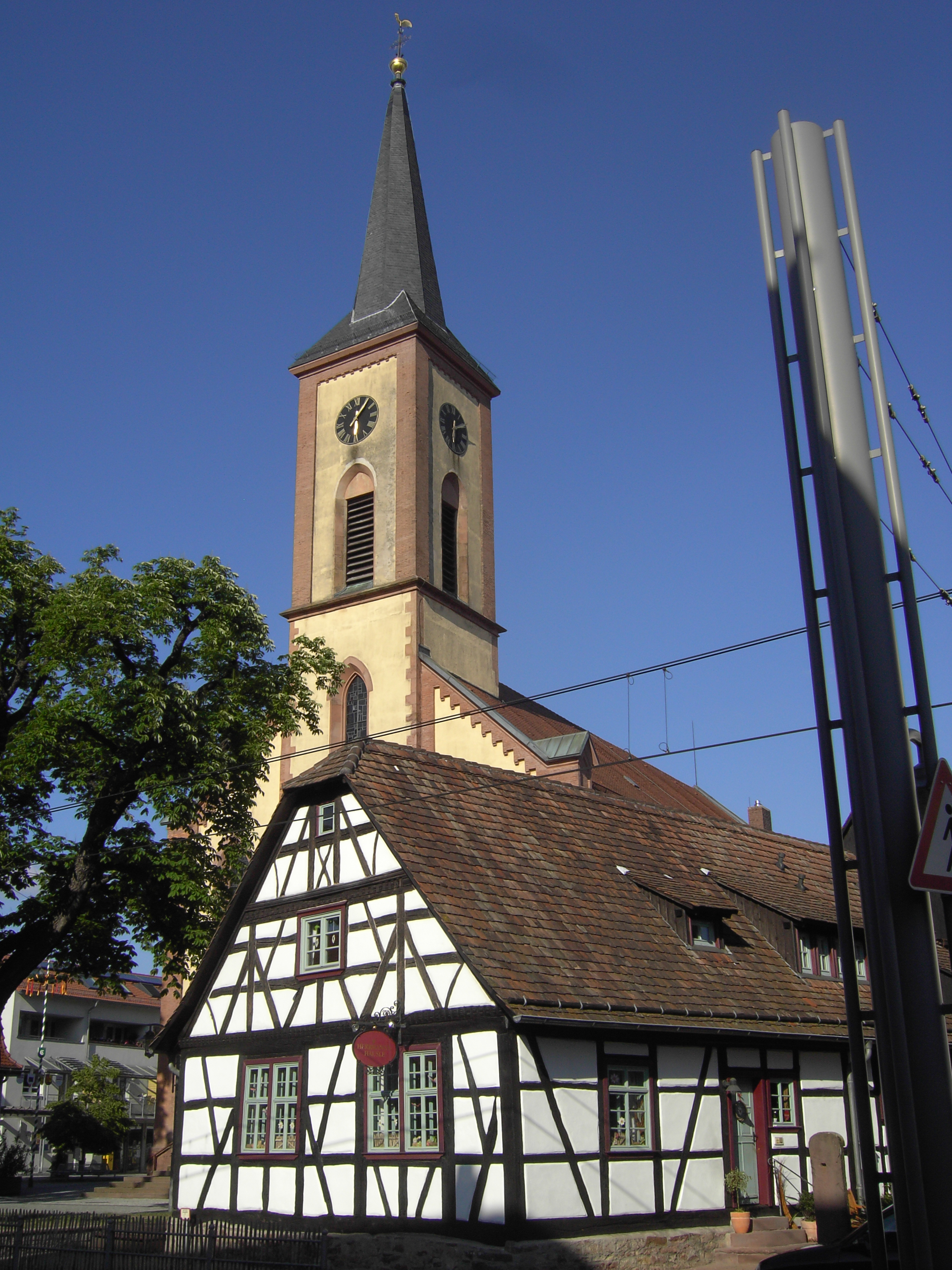 Stutensee-Blankenloch, Hermannshäusel und Evangelische Kirche